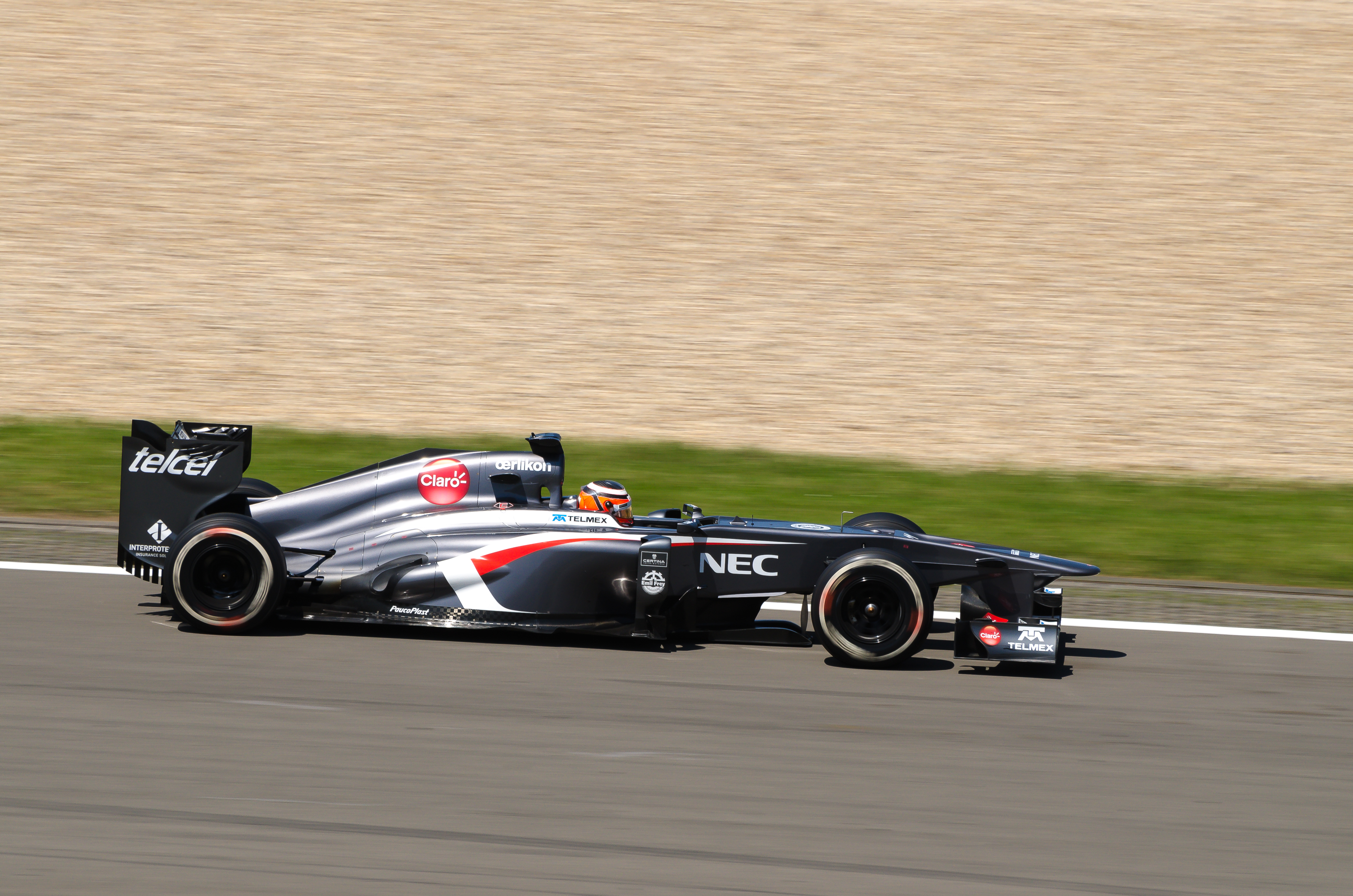 Nico Hülkenberg während dem Grossen Preis von Deutschland auf dem Nürburgring. Das Foto wurde zwischen ADVAN-Bogen und NGK-Schikane aufgenommen.